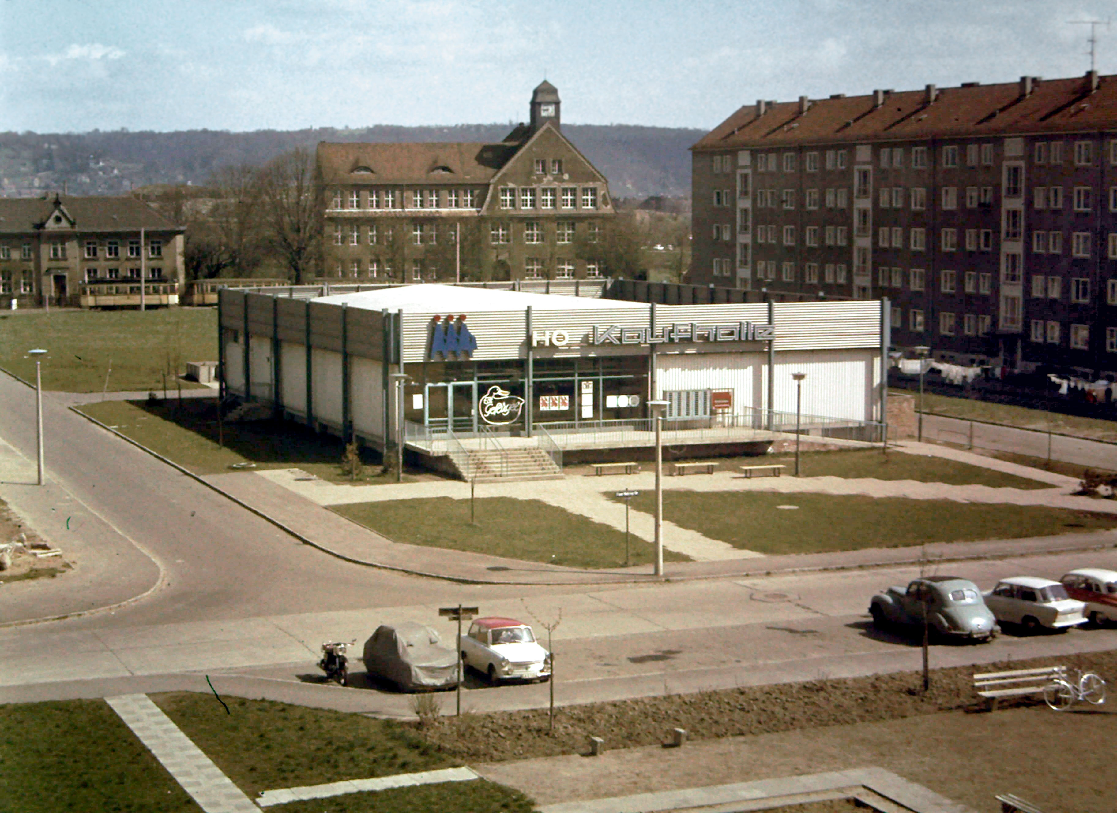 Dobritz Kaufhalle Schulen Straßenbahn Parkplatz ca. 1970